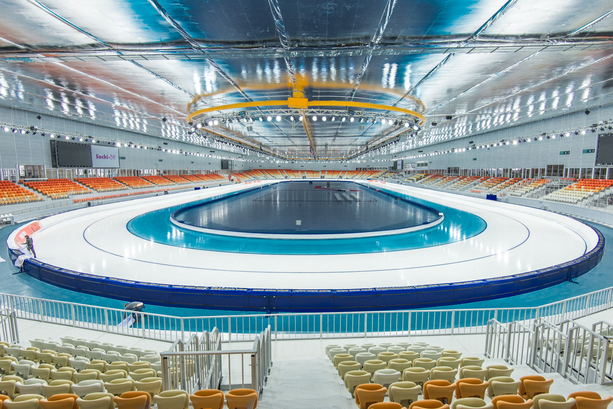 Крытый конькобежный центр Адлер Арена. Собственник объекта ОАО "Центр "Омега"